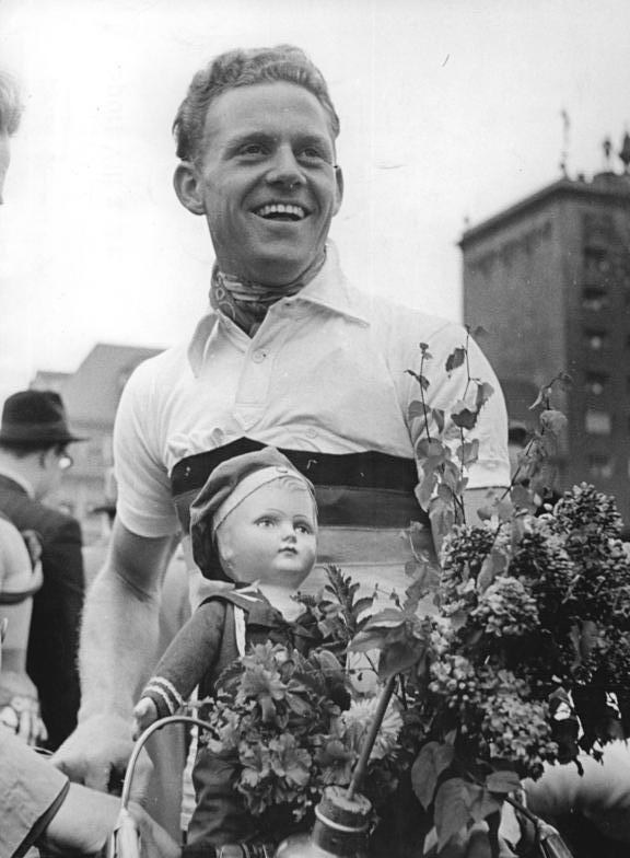 Zentralbild / Illner / 12.5.1955 - VIII. Internationale Friedensfahrt Prag-Berlin-Warschau 1955 - 8. Etappe von Leipzig nach Berlin über 200 km. UBz: Der strahlende Etappensieger in Leipzig, Schur (DDR).